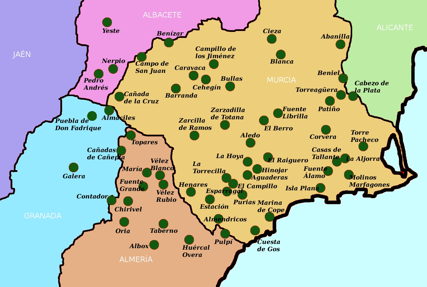 Localización de la mayor parte de las cuadrillas más o menos activas a la sazón en el Sureste